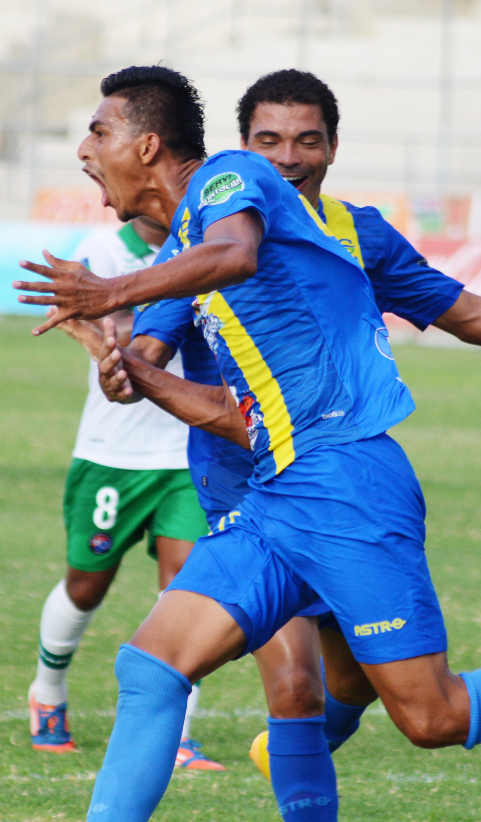 Byron Cano en Delfín Sporting Club de Manta-2015